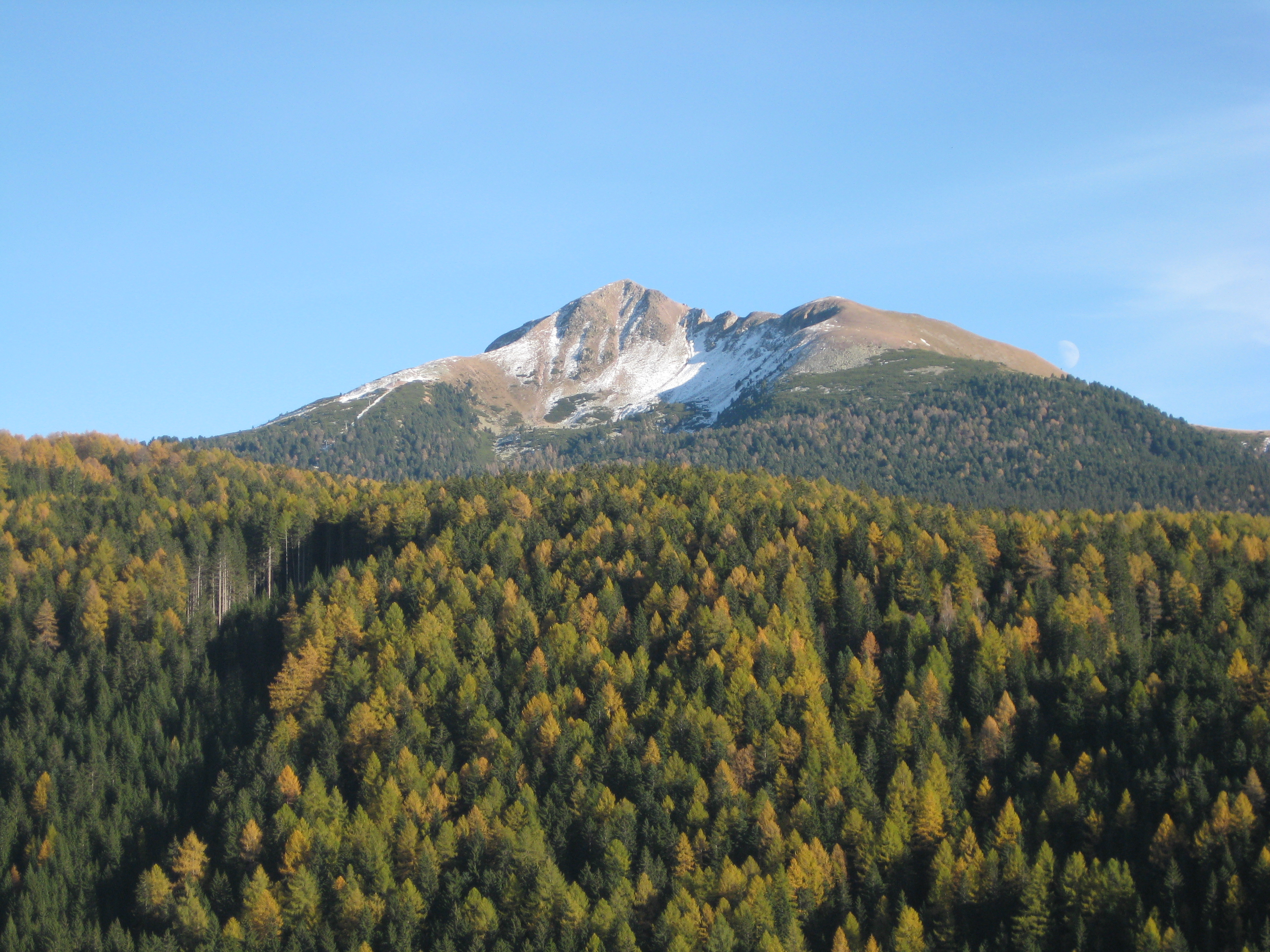 Blick auf das Schwarzhorn von Radein in Südtirol aus